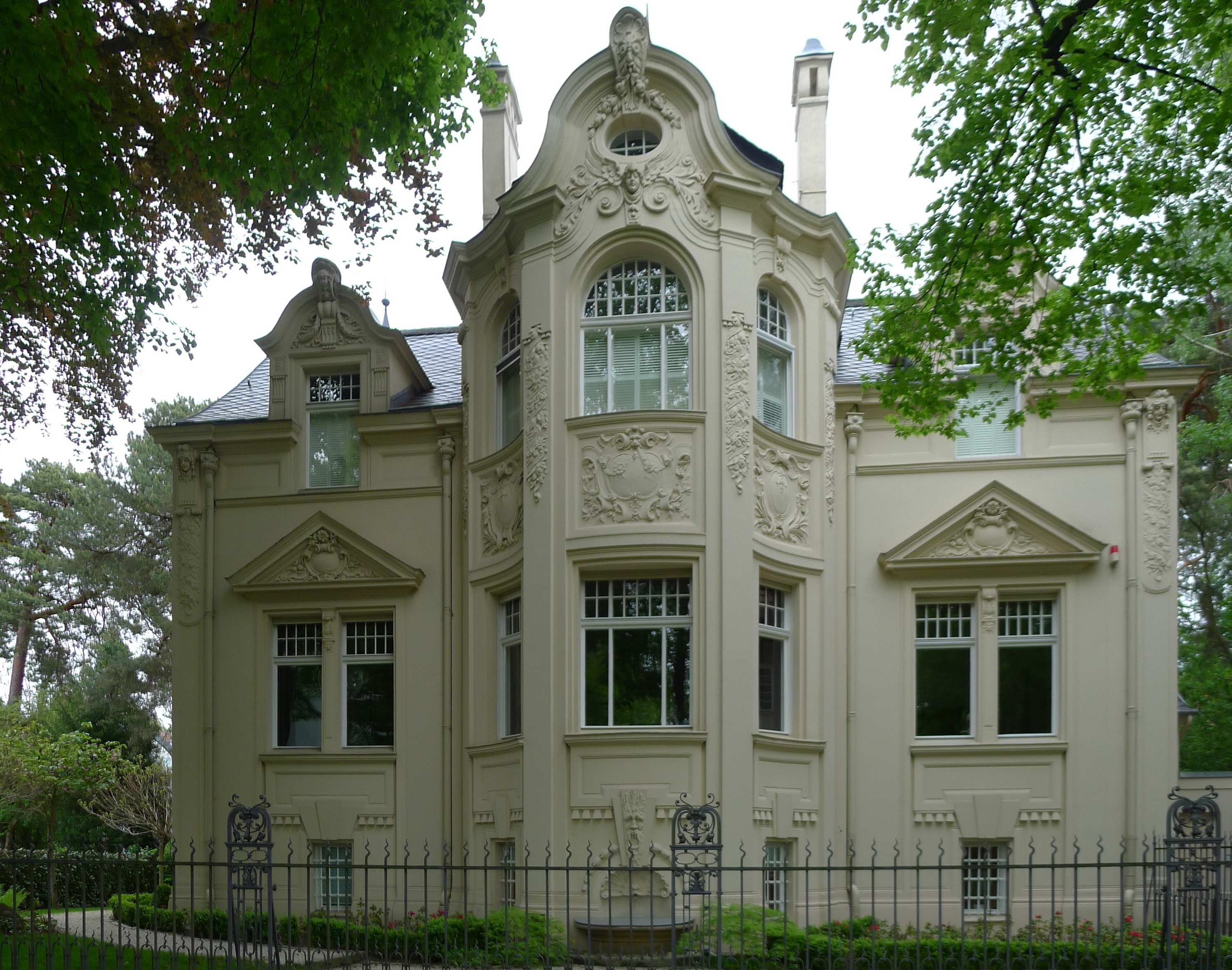 Villa Wernerstraße 10/12 in Berlin-Grunewald; erbaut 1896-1897; unter Denkmalachutz